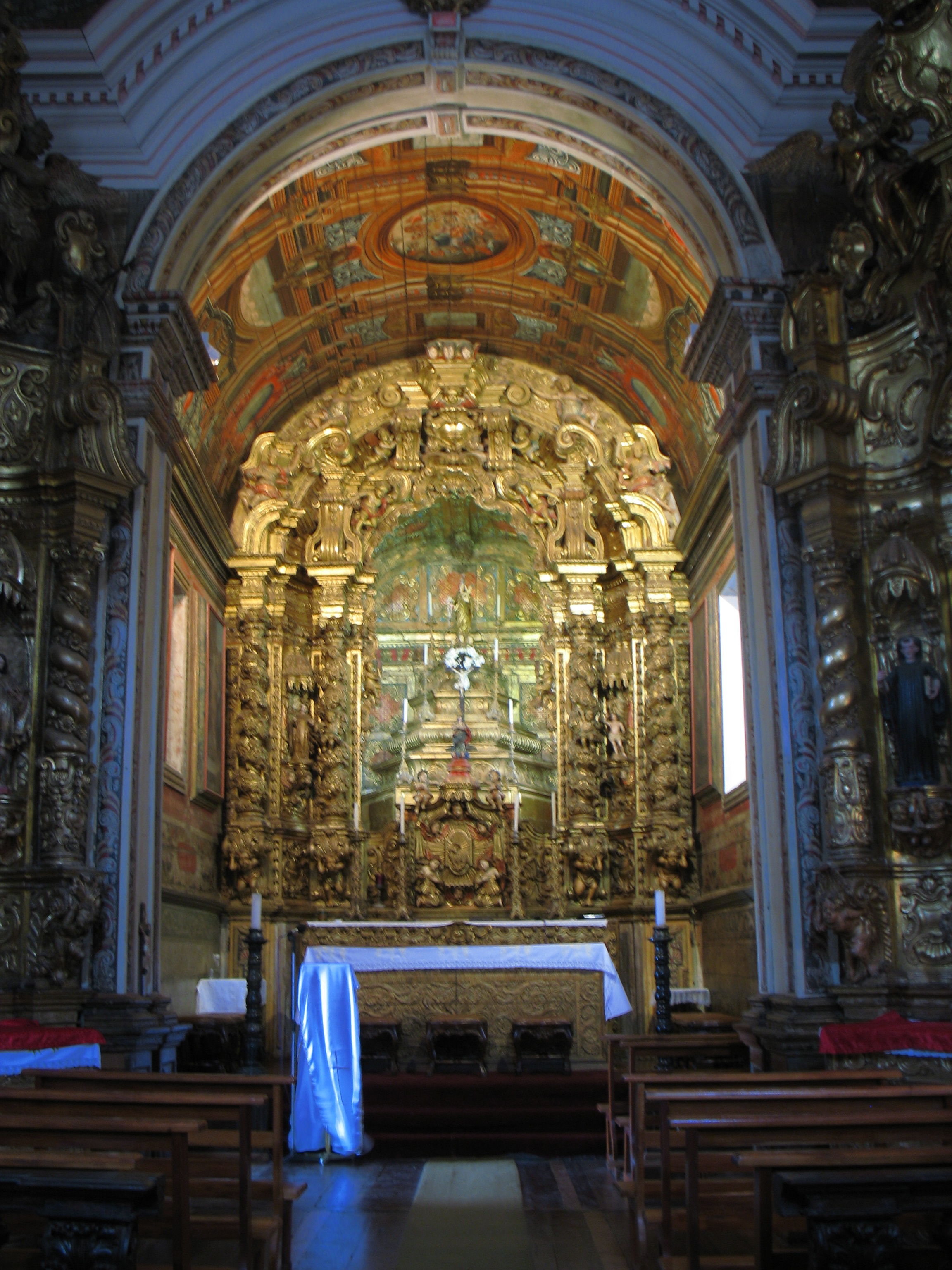 Capela de Nossa Senhora do [arraial do] Padre Faria Ouro Preto, c. 1740 [1710] Capela-Mor